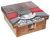 Exempel på golvbrunn monterad i träbjälklag med en monteringsplatta